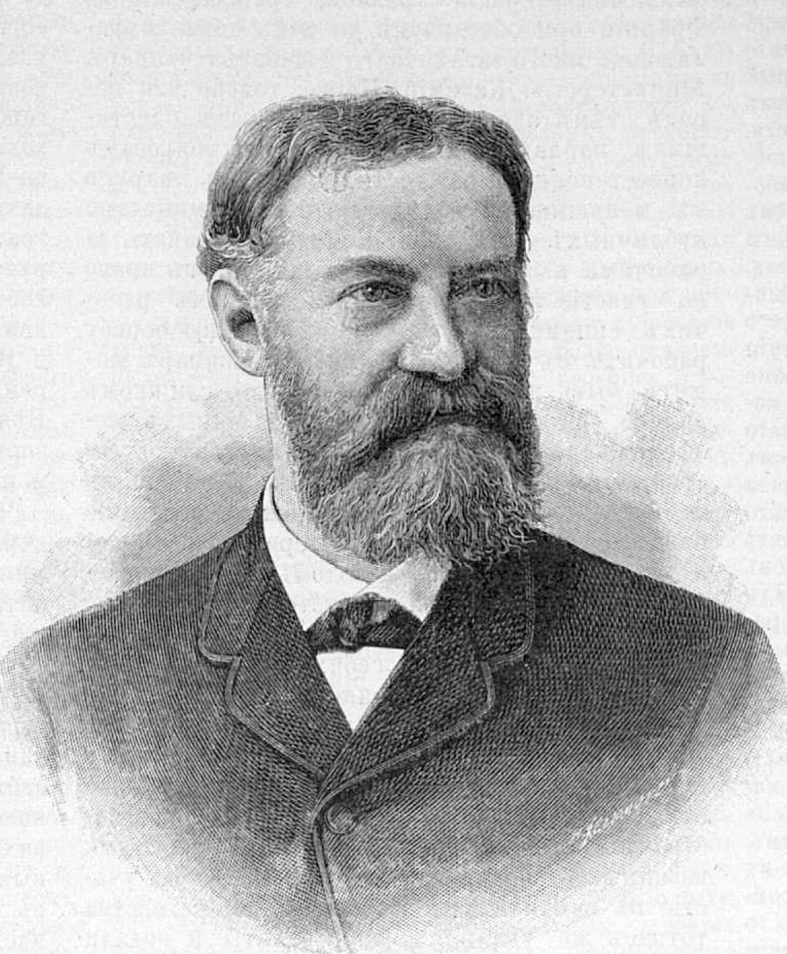 Шперк, Эдуард Фридрихович